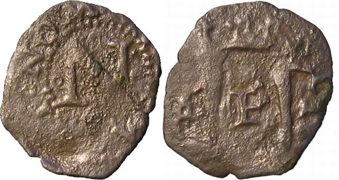 Tipo de moneda: Dinero de Navarra de Carlos I de Castilla, IV de Navarra y V del Sacro Imperio. Ceca: Pamplona. año: 1516-1566. Anverso: SIT NOMEN DOM ,alrededor de una N entre 4 puntos. Reverso: PLVS VLTRA , P entre columnas.